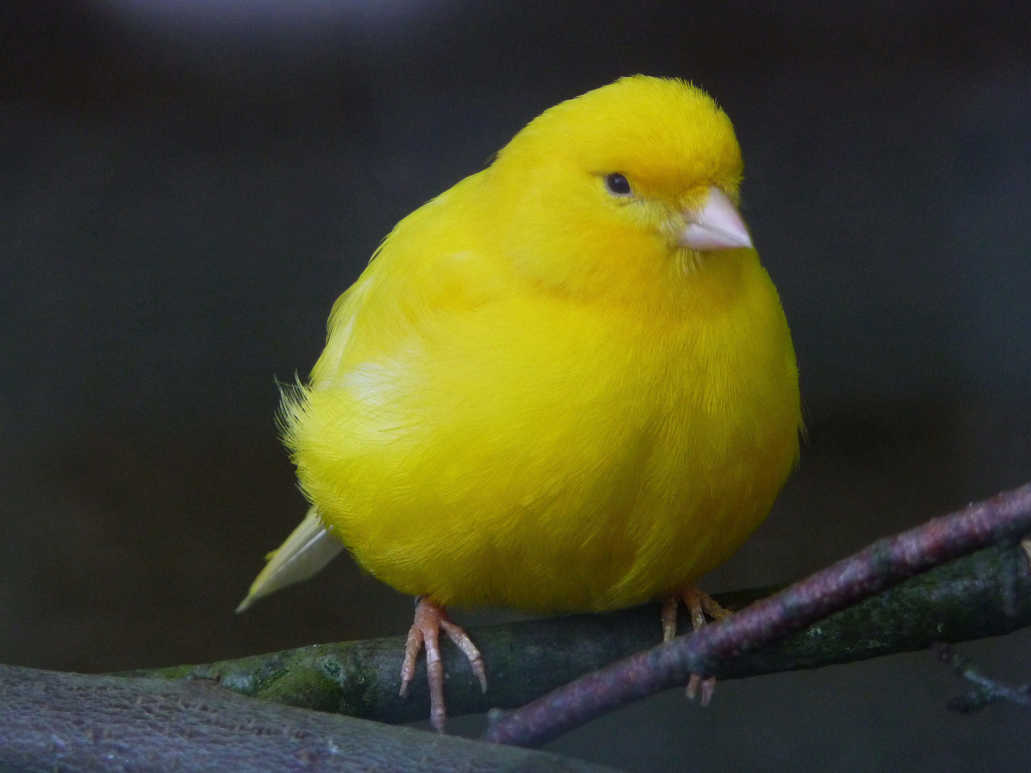 Gelber Kanarienvogel (Serinus canaria)